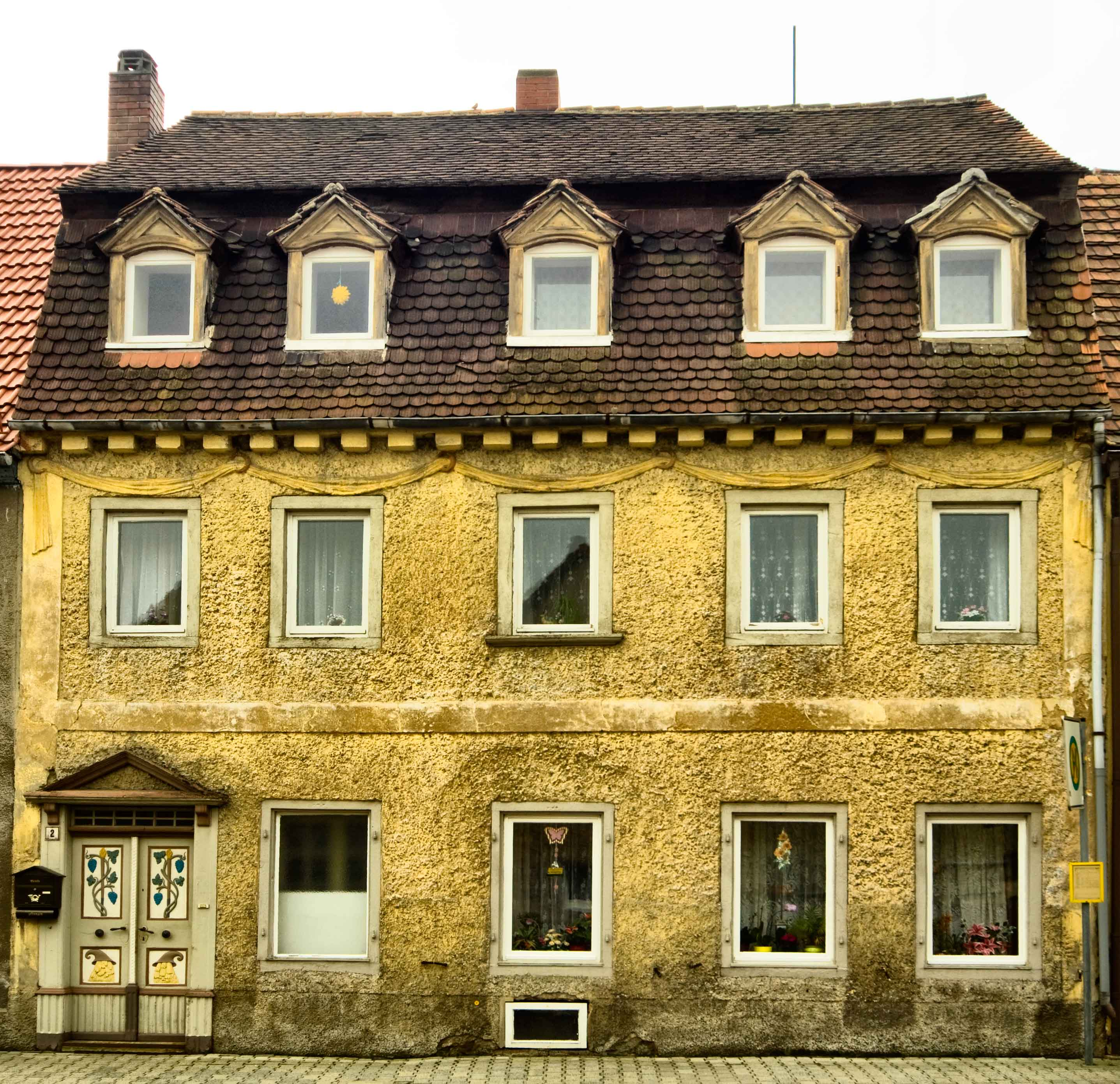 Haus des Tischlers Andreas Kolb frühes 18. Jahrhundert - heute Markt 2 in Calbitz, Ortsteil von Wermsdorf